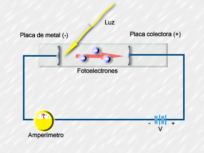 Esquema del efecto fotoeléctrico y la emisión de fotoelectrones